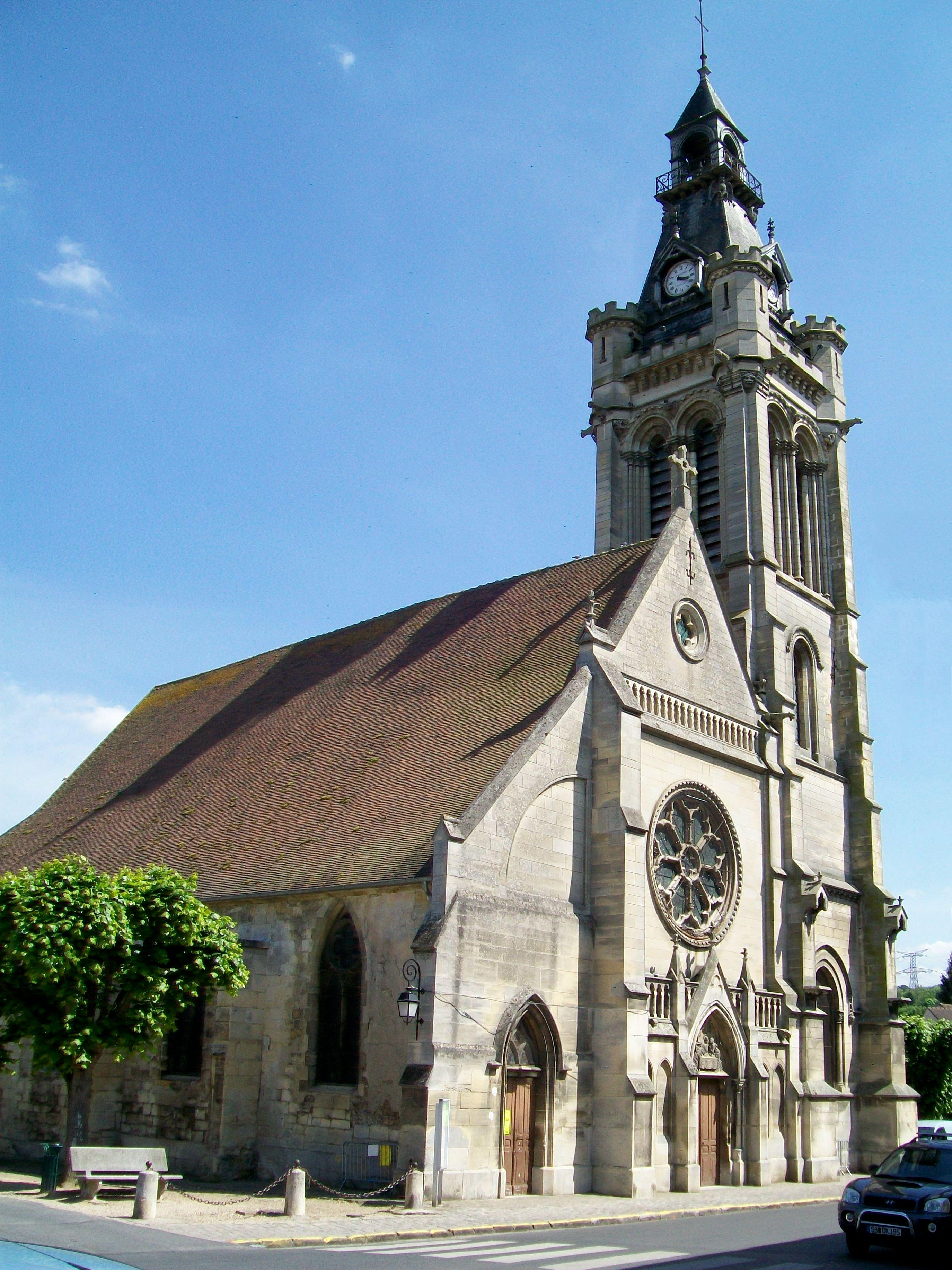 L'église Saint-Pierre-et-Paul vue depuis la place du château, avec la façade ouest et le clocher de 1885, ainsi que le bas-côté nord (à gauche) de 1300 environ.